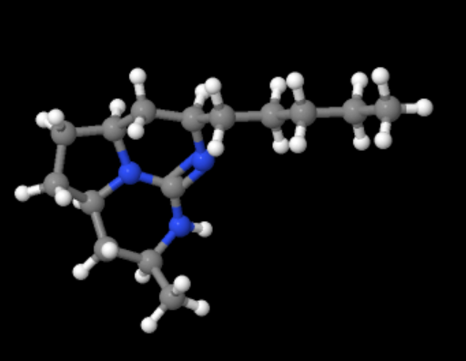 Estructura 3D de la batzelladina K